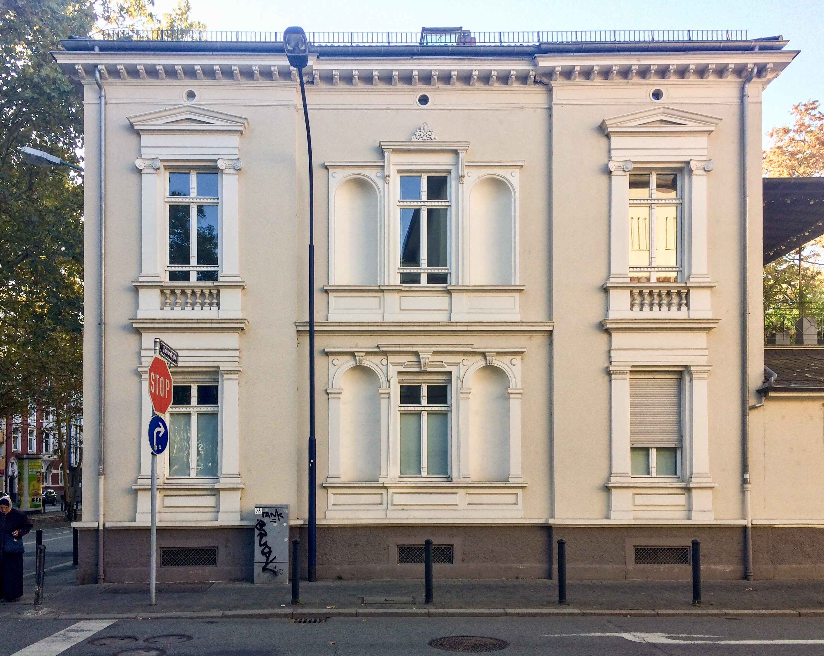 Stadtvilla Kaiserstraße 102 in Offenbach am Main